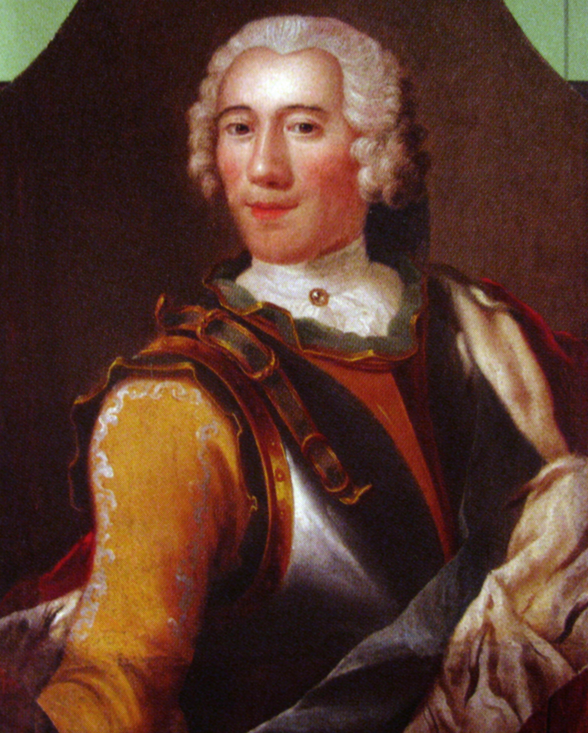 Stanisław Wincenty Jabłonowski